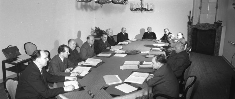 Zentralbild/Heilig/Weiß 20.4.1955 Das Politbüro der Sozialistischen Einheitspartei Deutschlands (Von links nach rechts): Alfred Neumann (Kandidat des Politbüros); Erich Honecker (Kandidat des Politbüros); Erich Mückenberger (Kandidat des Politbüros); Karl Schirdewan (Mitglied des Politbüros); Willi Stoph (Mitglied des Politbüros); Hermann Matern (Mitglied des Politbüros); Walter Ulbricht (Mitglied des Politbüros); Wilhelm Pieck (Mitglied des Politbüros); Otto Grotewohl (Mitglied des Politbüros); Fred Oelßner (Mitglied des Politbüros); Friedrich Ebert (Mitglied des Politbüros); Heinrich Rau (Mitglied des Politbüros); Herbert Warnke (Kandidat des Politbüros); Bruno Leuschner (Kandidat des Politbüros). (Panorama)